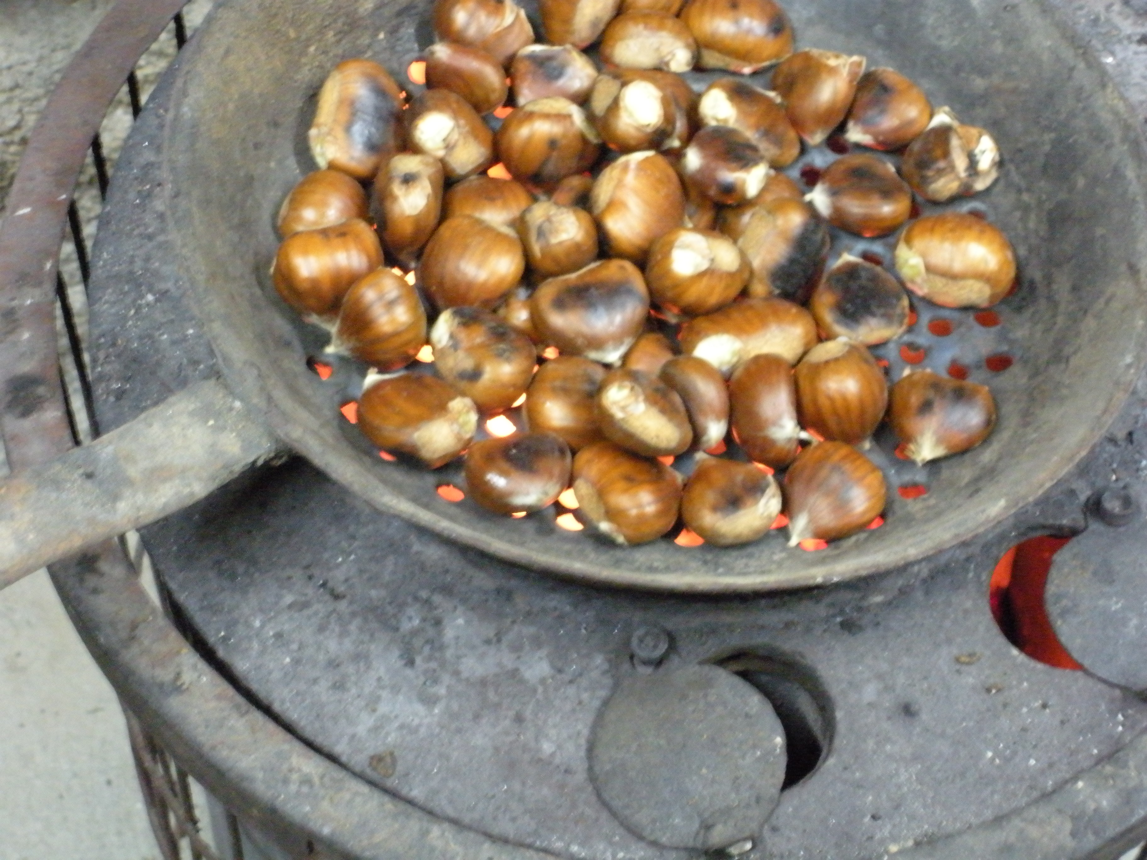 Imagen de catañas asándose en un tixolo/tambor